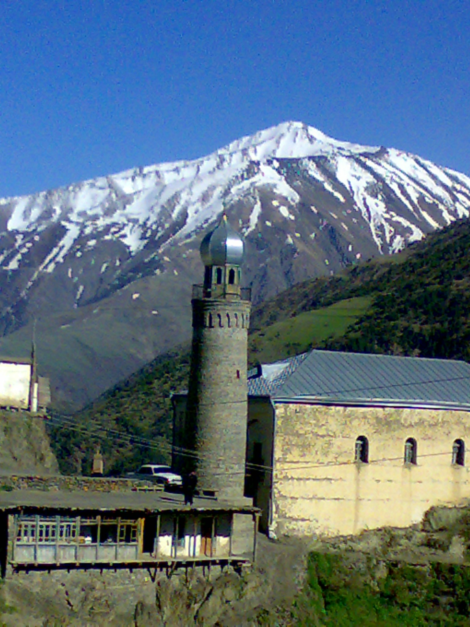 медресе с. Цахур рес. Дагестан